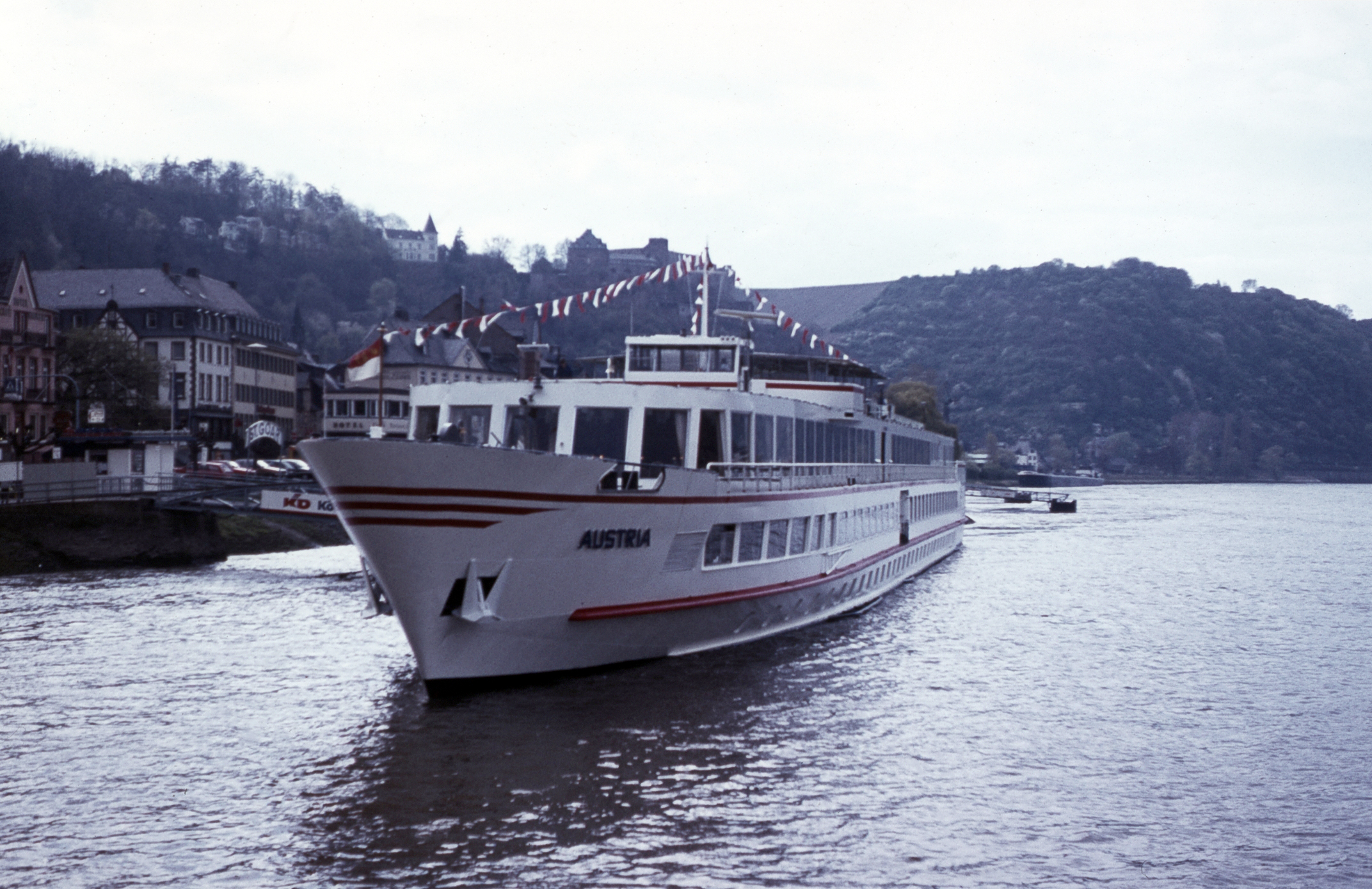 Das Kabinenfahrgastschiff Austria am Anleger St. Goar.